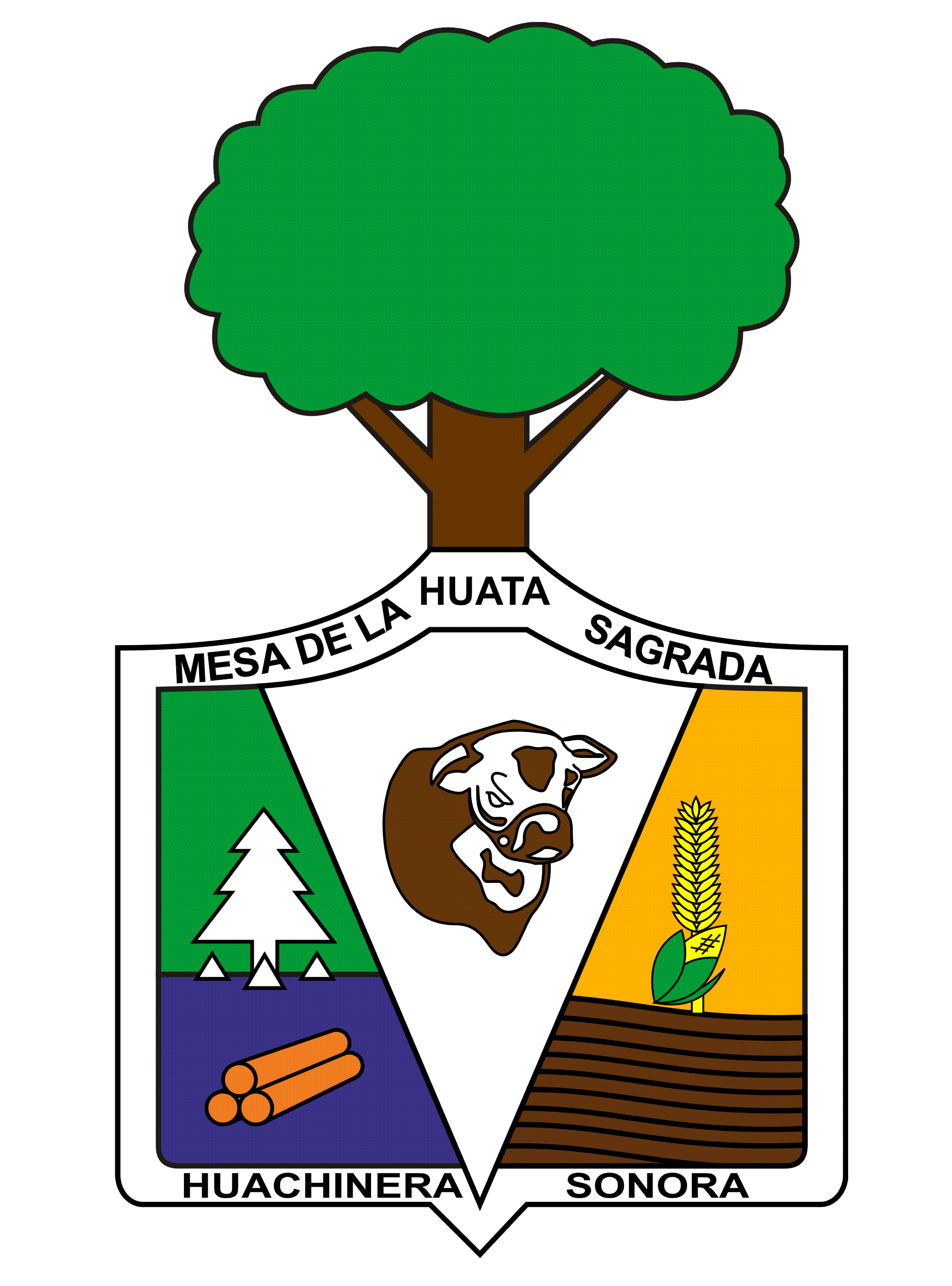 Escudo del municipio sonorense.